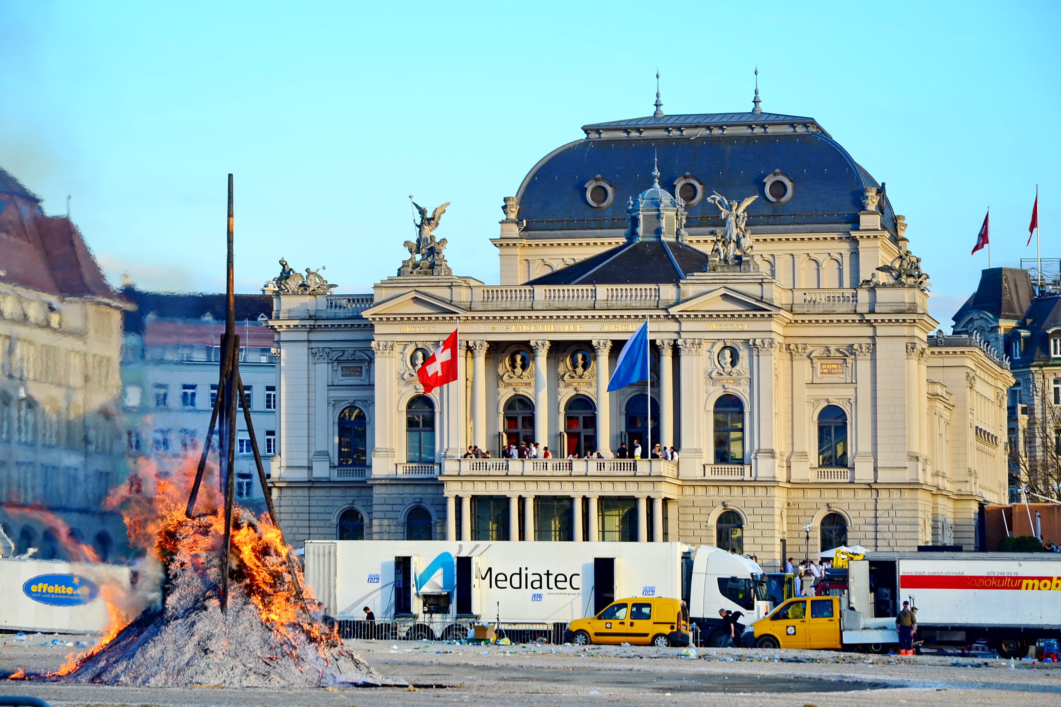 Sechseläuten 2013 : Sechseläutenplatz, Opernhaus in Zürich (Switzerland)